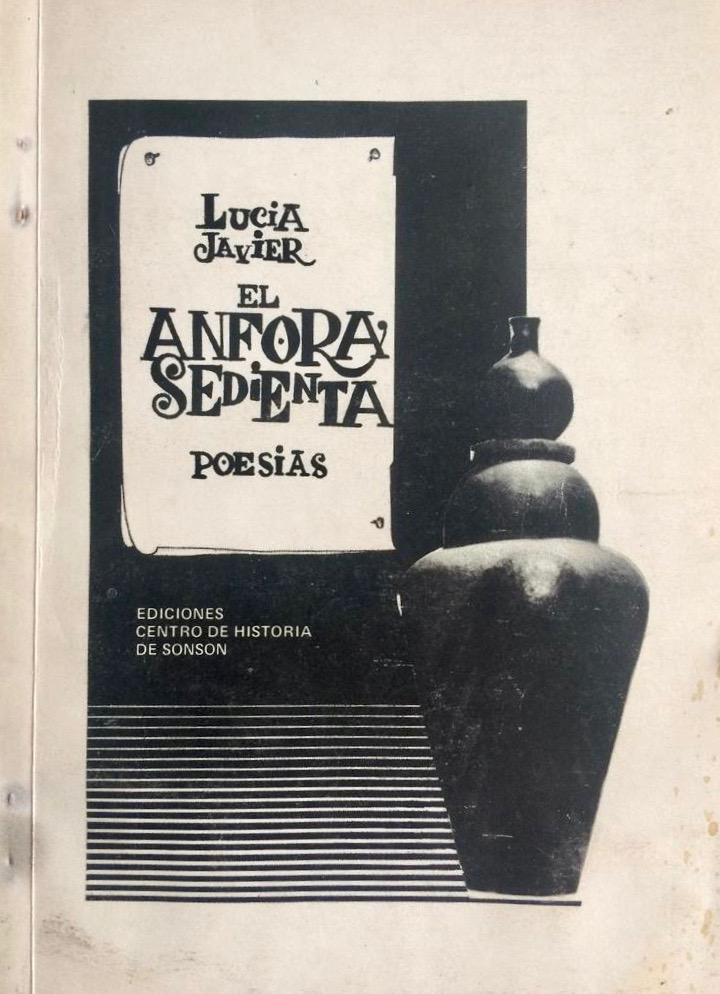 Portada de "El ánfora sedienta", de Lucía Javier; publicado por el Centro de historia de Sonsón.